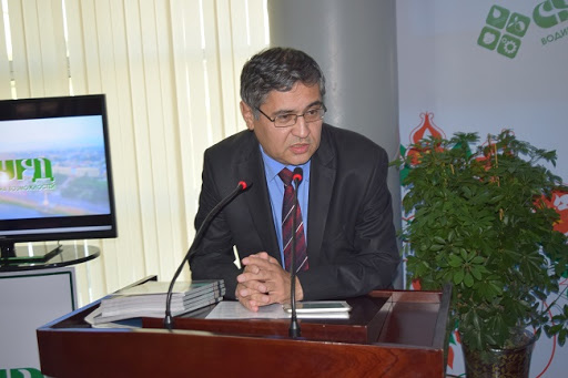 Ректор Таджикского госуниверситета им. академика Б. Гафурова Анвар Максудов в международном торгово-инвестиционный форуме «Экспортный потенциал и развитие международной торговли»